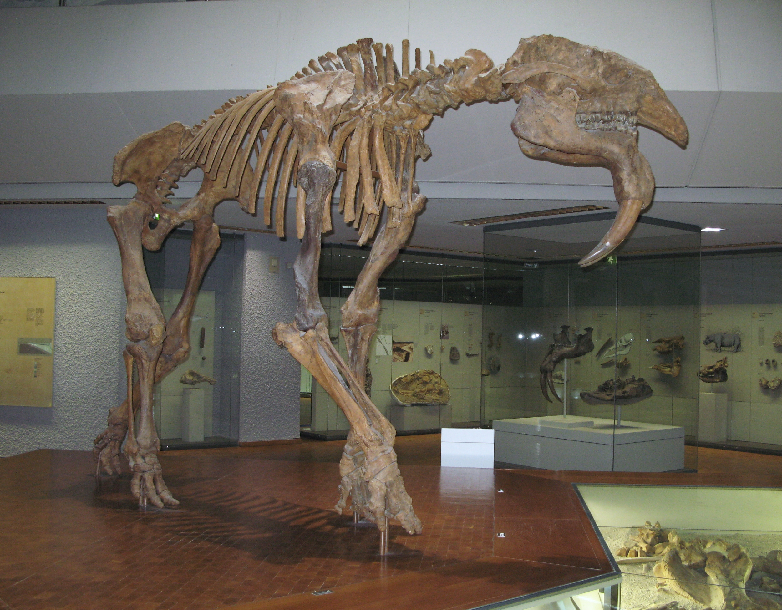 Hauerelefant (Prodeinotherium) - Süßwassermolasse, Langenau - aufgenommen im Museum am Löwentor, Stuttgart